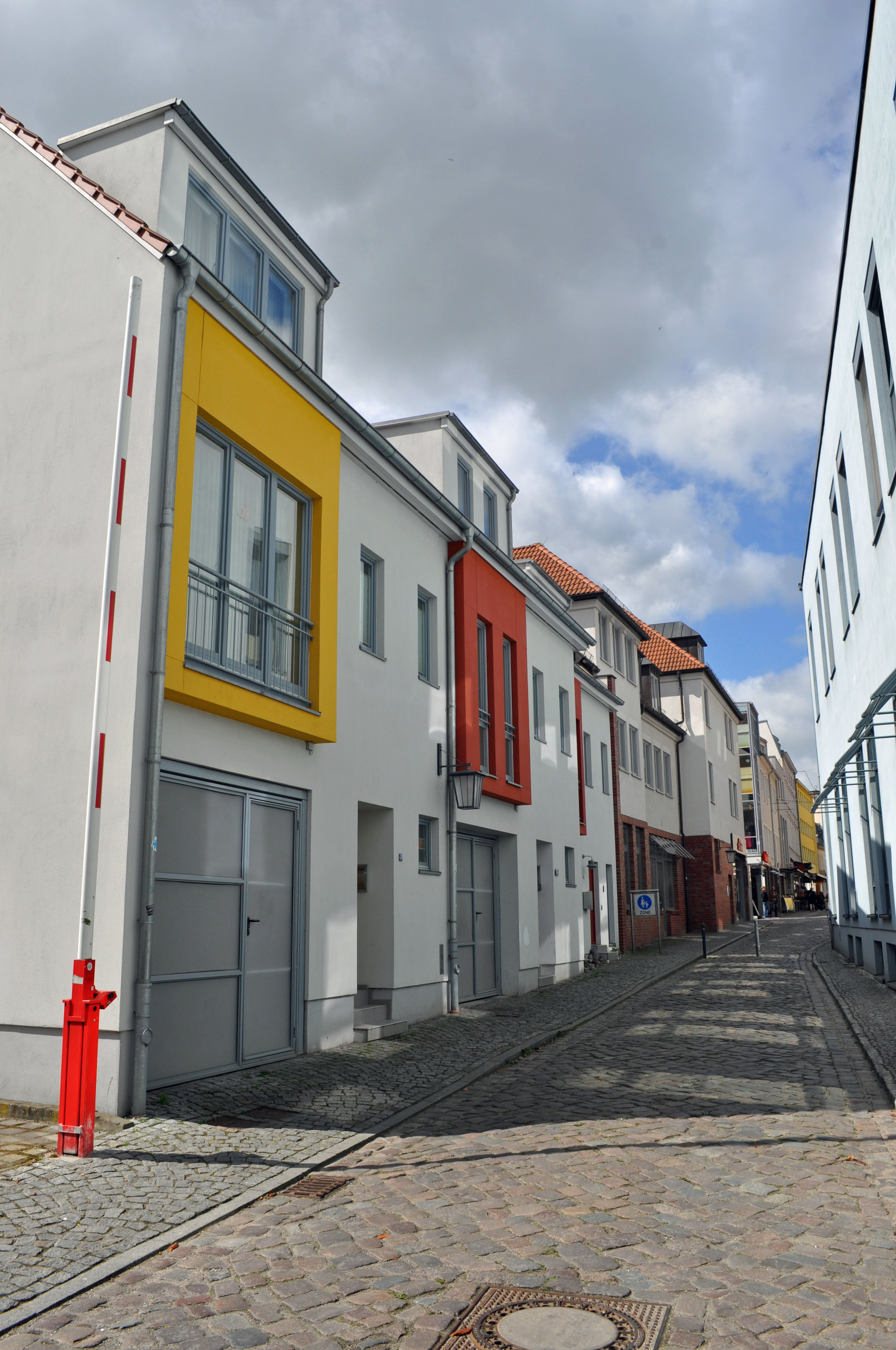 Gebäude in Stralsund, siehe Dateiname